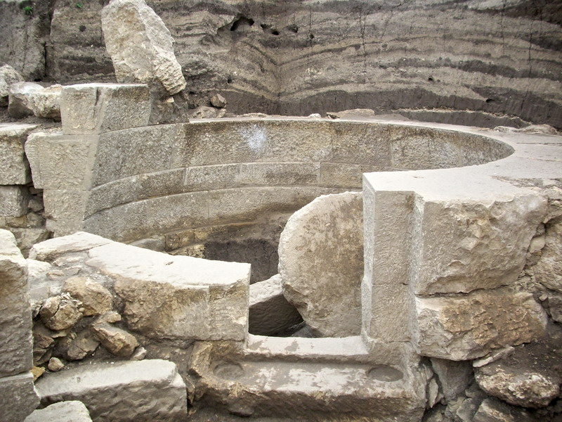 Гаговската тракийска гробница - останките от входа, свързващ двете куполни камери на гробното съоръжение.